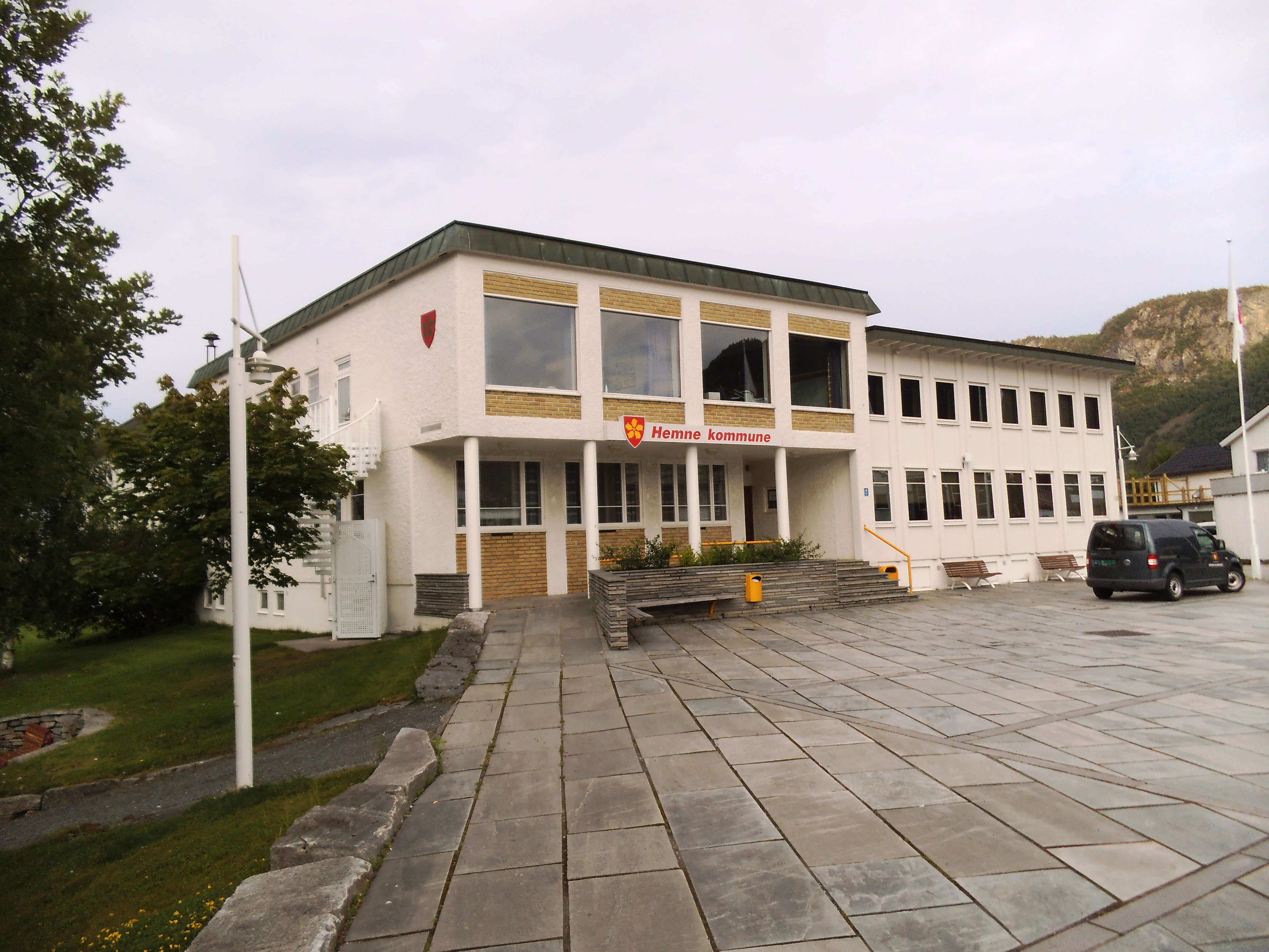 Rådhuset